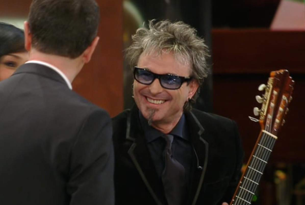 foto scattata a Mauro di Domenico dalla moglie Elisabetta Martinico la sera del 15 febbraio 2013 a Sanremo in occasione della sua esibizione per accompagnare la cantante Maria Nazionale, in una versione di "Perdere l'amore" di Massimo Ranieri, nella serata dedicata al Revival dei successi sanremesi del passato.